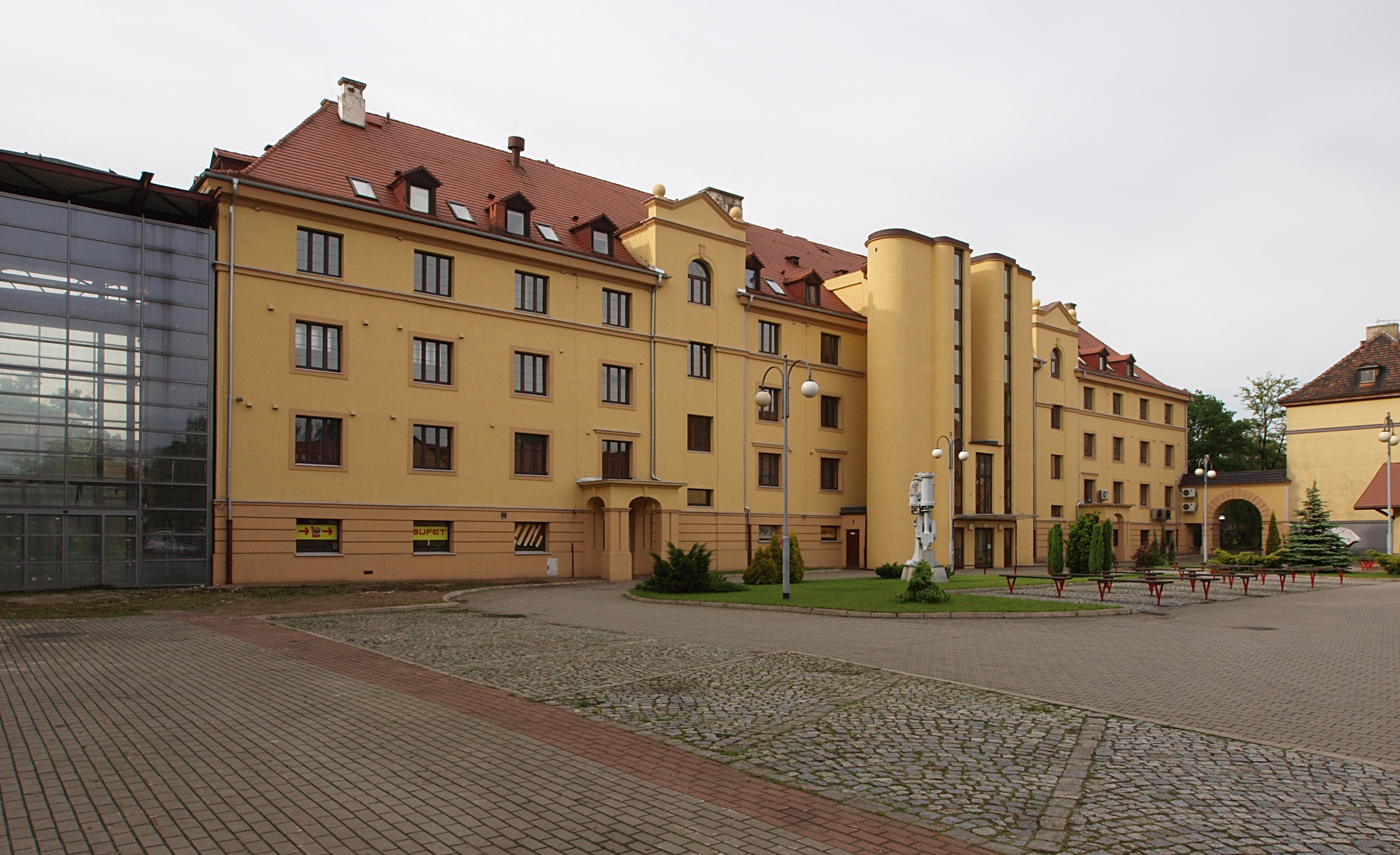 Ulica Roosevelta w Zabrzu. Budynek A Wydziału Organizacji i Zarządzania Politechniki Śląskiej.